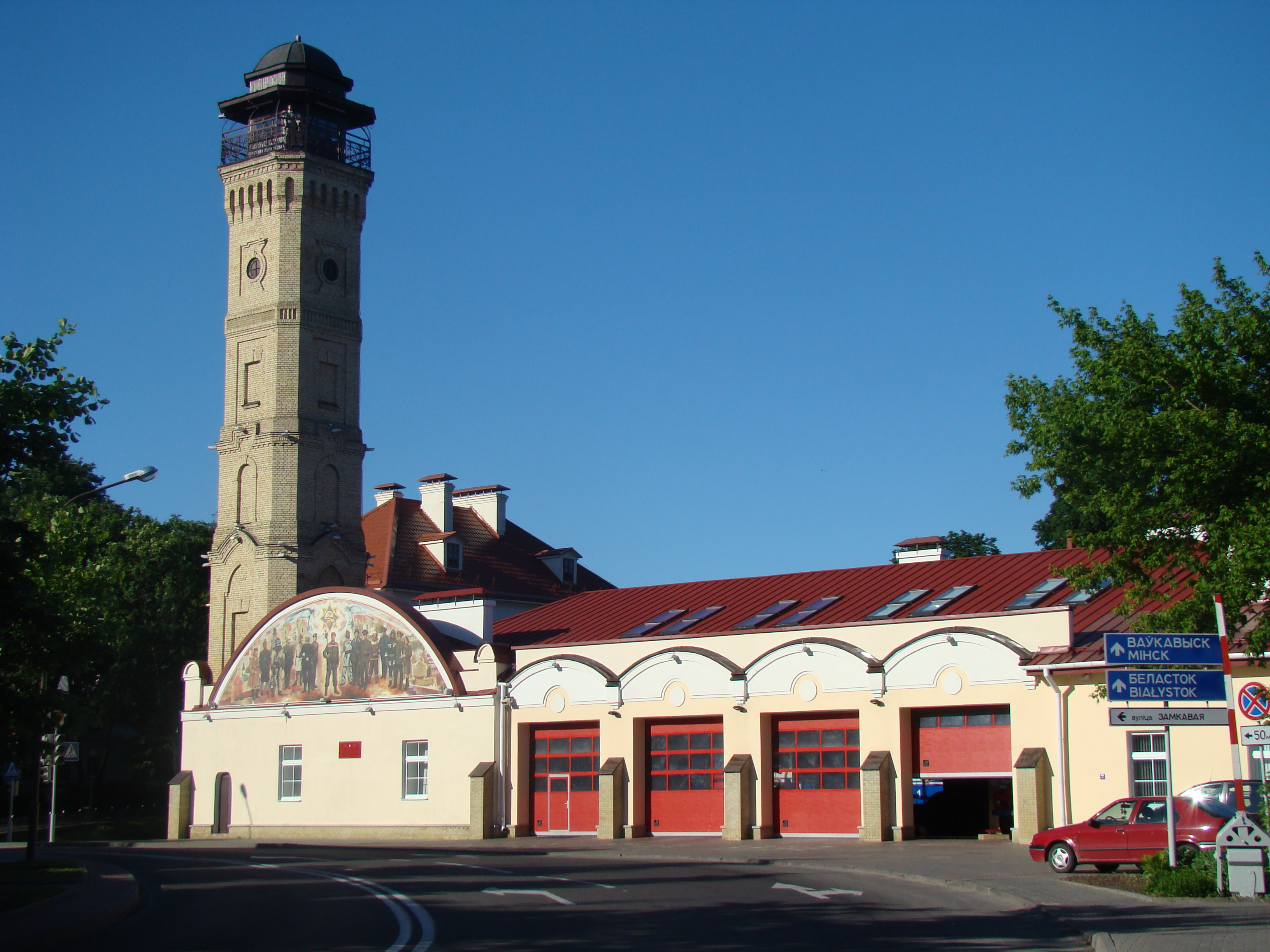 Беларуская (тарашкевіца): Забудова вул. Замкавай, у тым ліку комплекс былога палаца XVIII стагодзьдзя (Храптовіча, Тызэнгаўза, Мучынскага, Ляхніцкага), былы флігель каралеўскіх стайняў і пажарная каланча. г. Горадня This is a photo of Belarusian heritage monument. Reference number: 412Г000014 ( WLM)